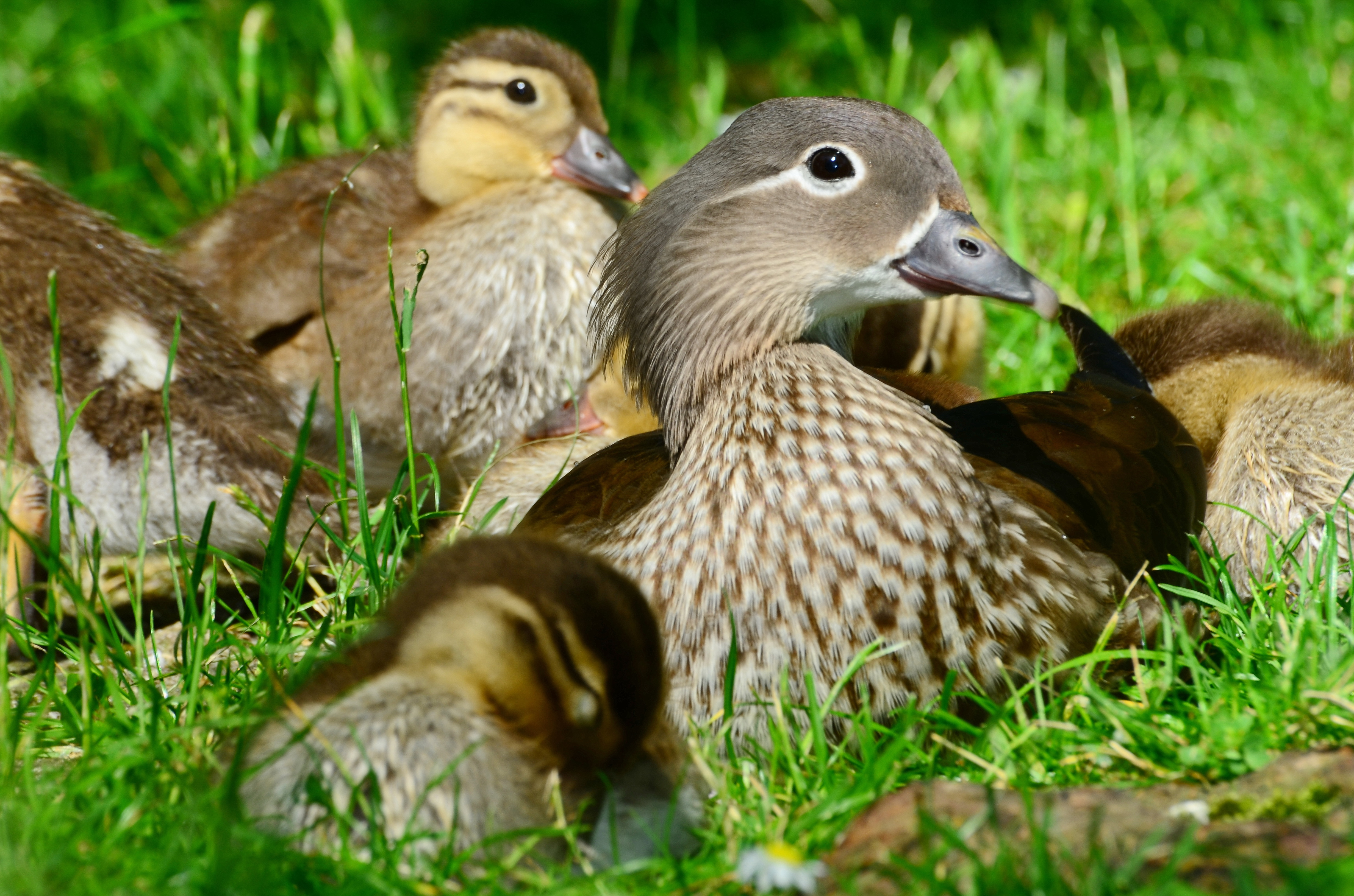 Aix galericulata, 'Nymphenteich', Zürichhorn in Zürich-Seefeld (Switzerland)